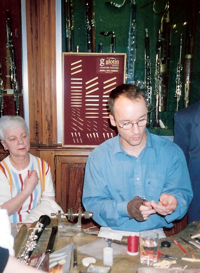 Photographie du hautboïste Dominique ENON. Démonstration de montage et grattage d'anches de hautbois lors des portes ouvertes au musée des instruments à vent de La Couture-Boussey